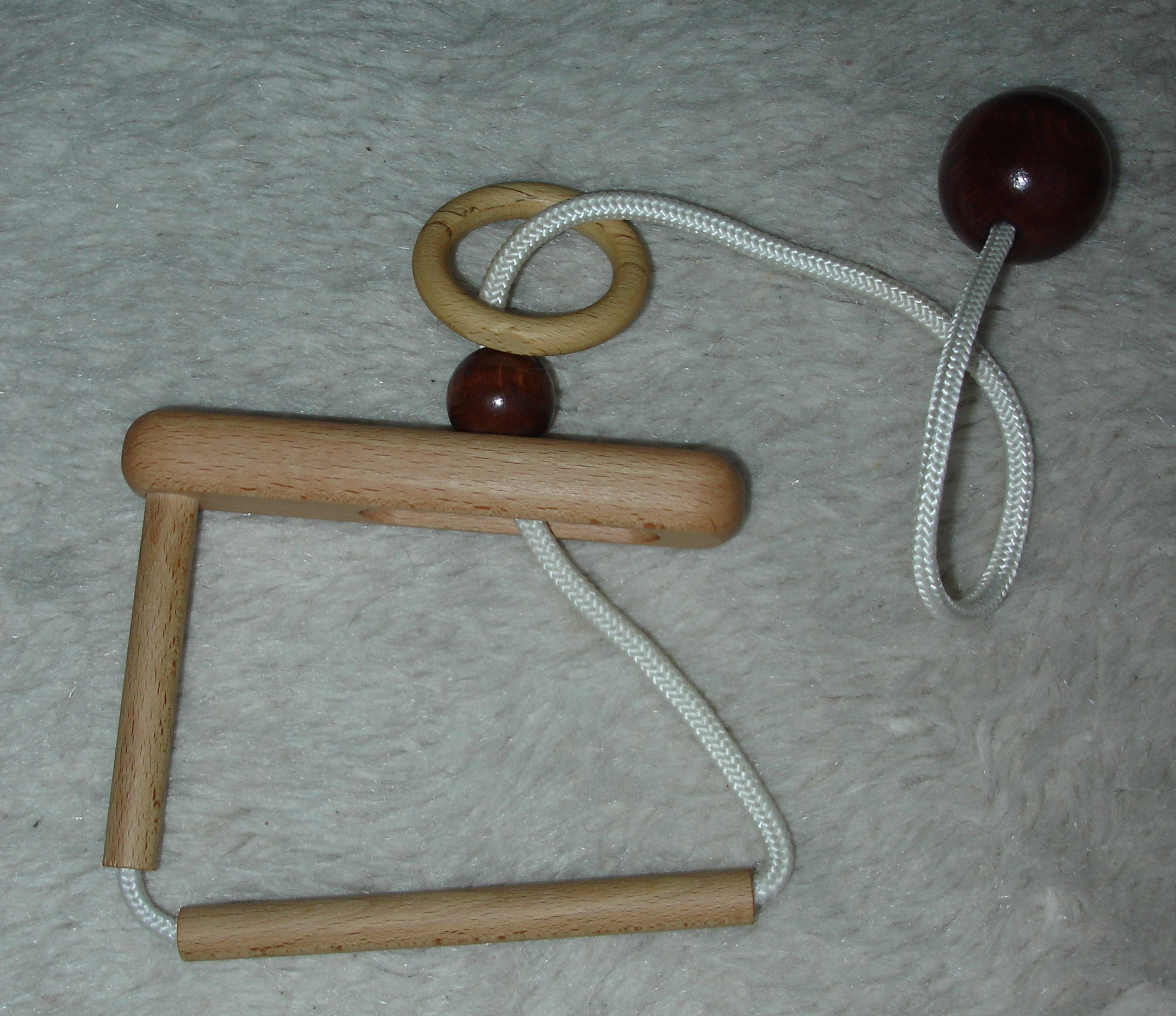 Mechanical puzzles